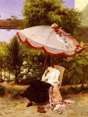 La Siesta, mujer pintada por pedro lira